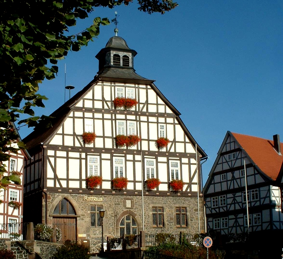 Rathaus in Homberg (Efze)